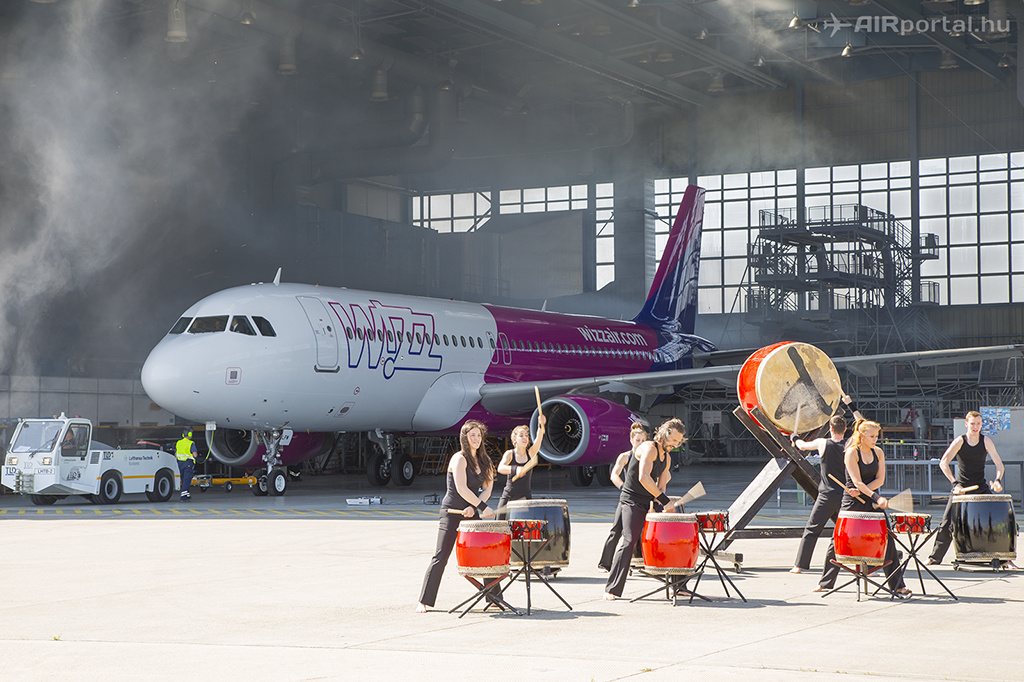 A Wizz Air új festésű repülőgépe a budapesti bemutatóján.